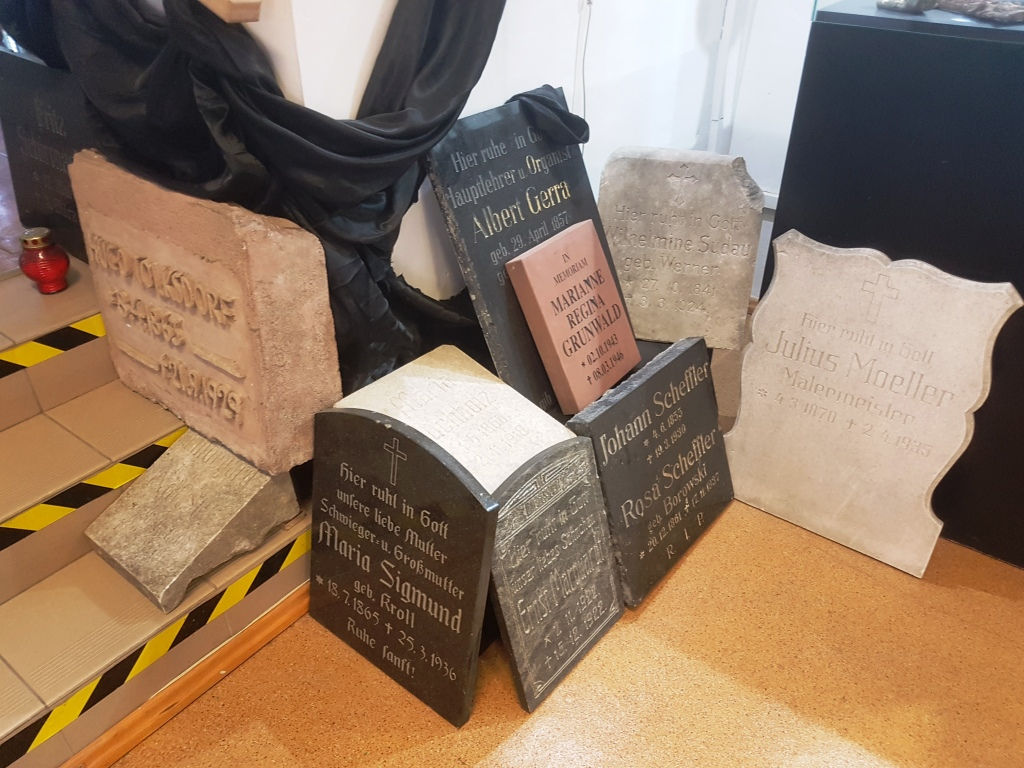 tablice nagrobne, muzeum Braniewo, za zgodą zarządcy muzeum